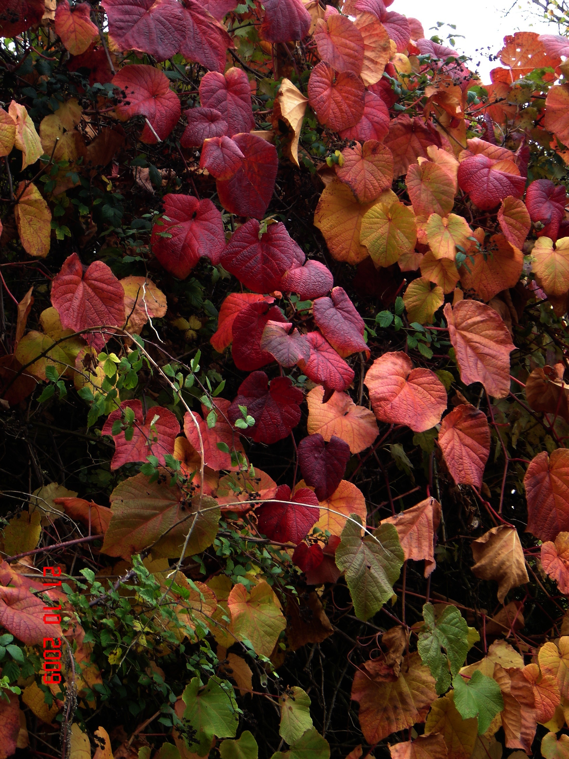 Vitis coignetiae